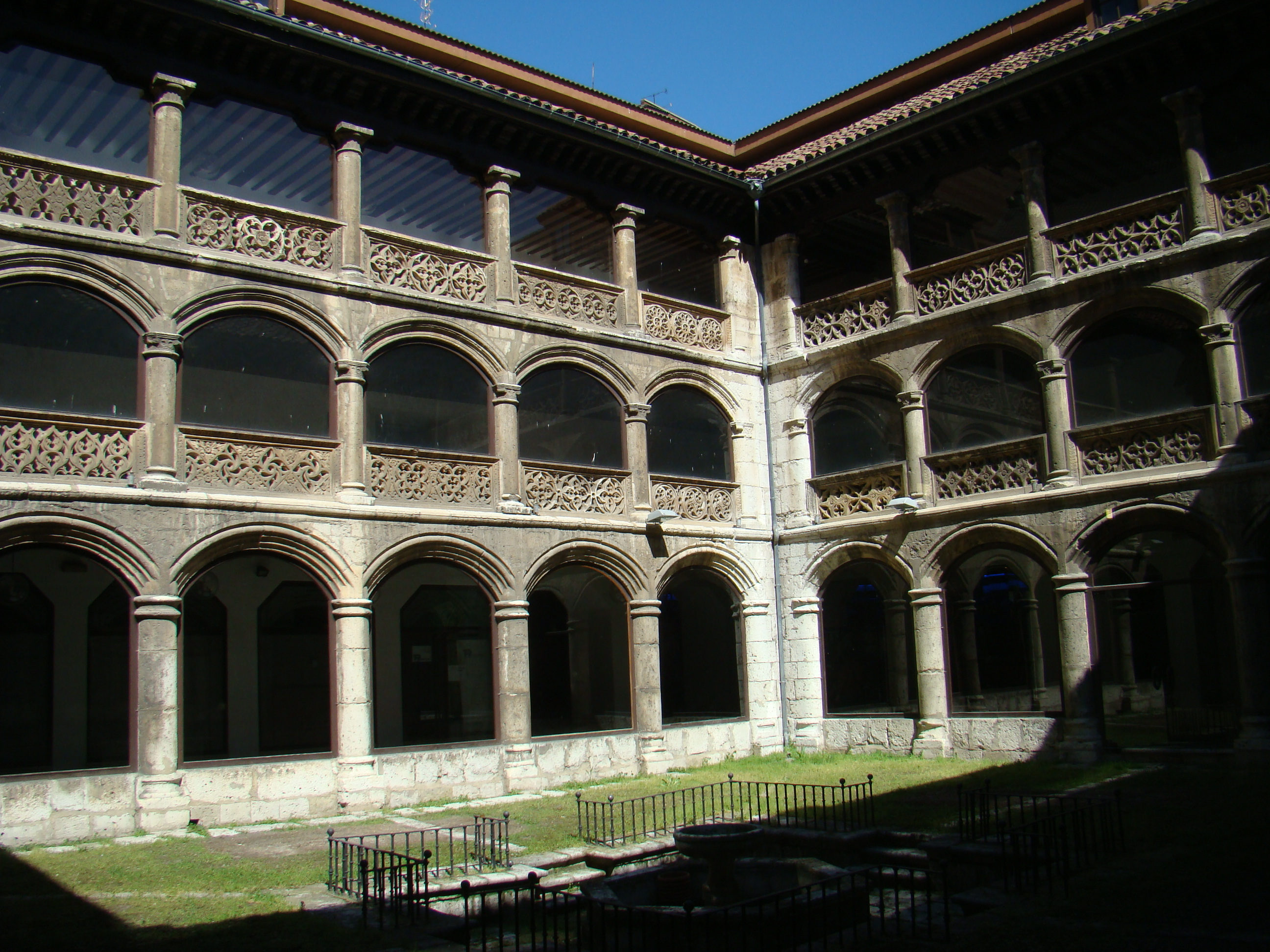 Valladolid (España). Claustro del edificio conocido familiarmente como Las Francesas. En su origen fue el convento de Santa Cruz de comendadoras de Santiago. En 1886 a las monjas dominicas francesas se instalaron en Valladolid y abrieron en el edificio un colegio. El nombre familiar de "Las francesas" se empezó a utilizar a raíz de la existencia del colegio. En el último tercio el siglo XX las monjas se trasladaron a otro lugar después de vender la propiedad. Se construyó un edificio de viviendas y un centro comercial, salvándose la iglesia que el Ayuntamiento utiliza para exposiciones. También se conserva el claustro conocido vulgarmente como patio de las tabas por adornarse el pavimento con tabas y guijarros de río. También se conserva en el interior la escalera monacal.